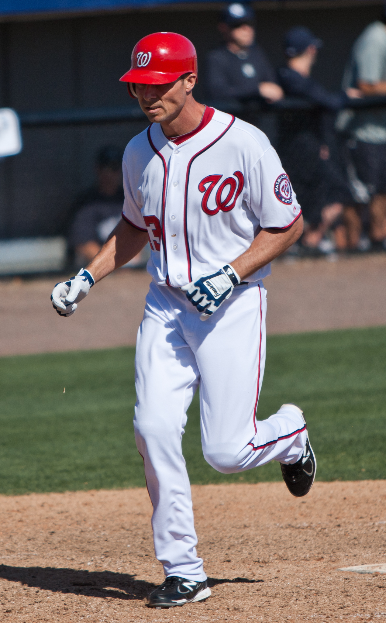 Rick Ankiel